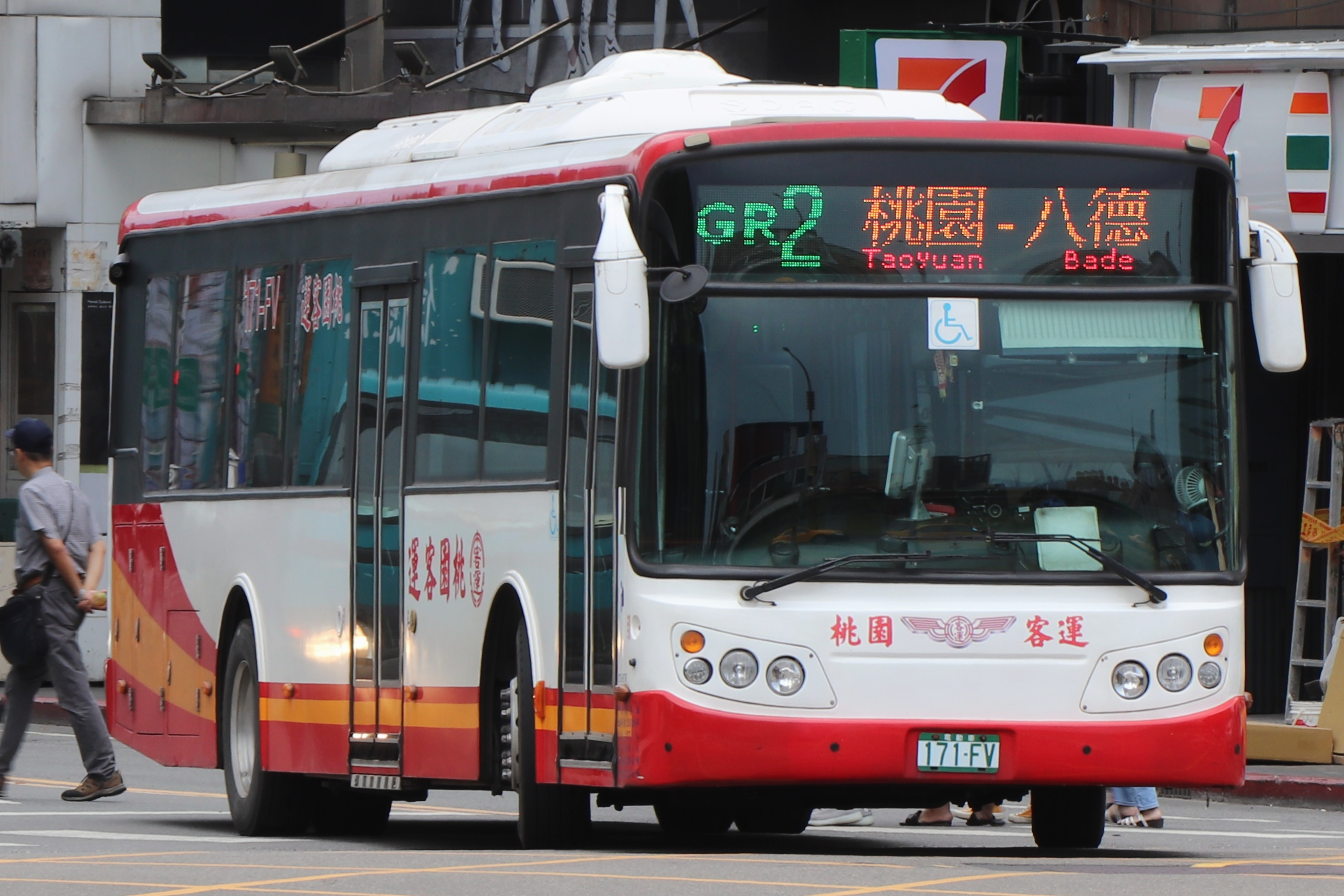 桃園客運 華德 RACE150大客車 171-FV